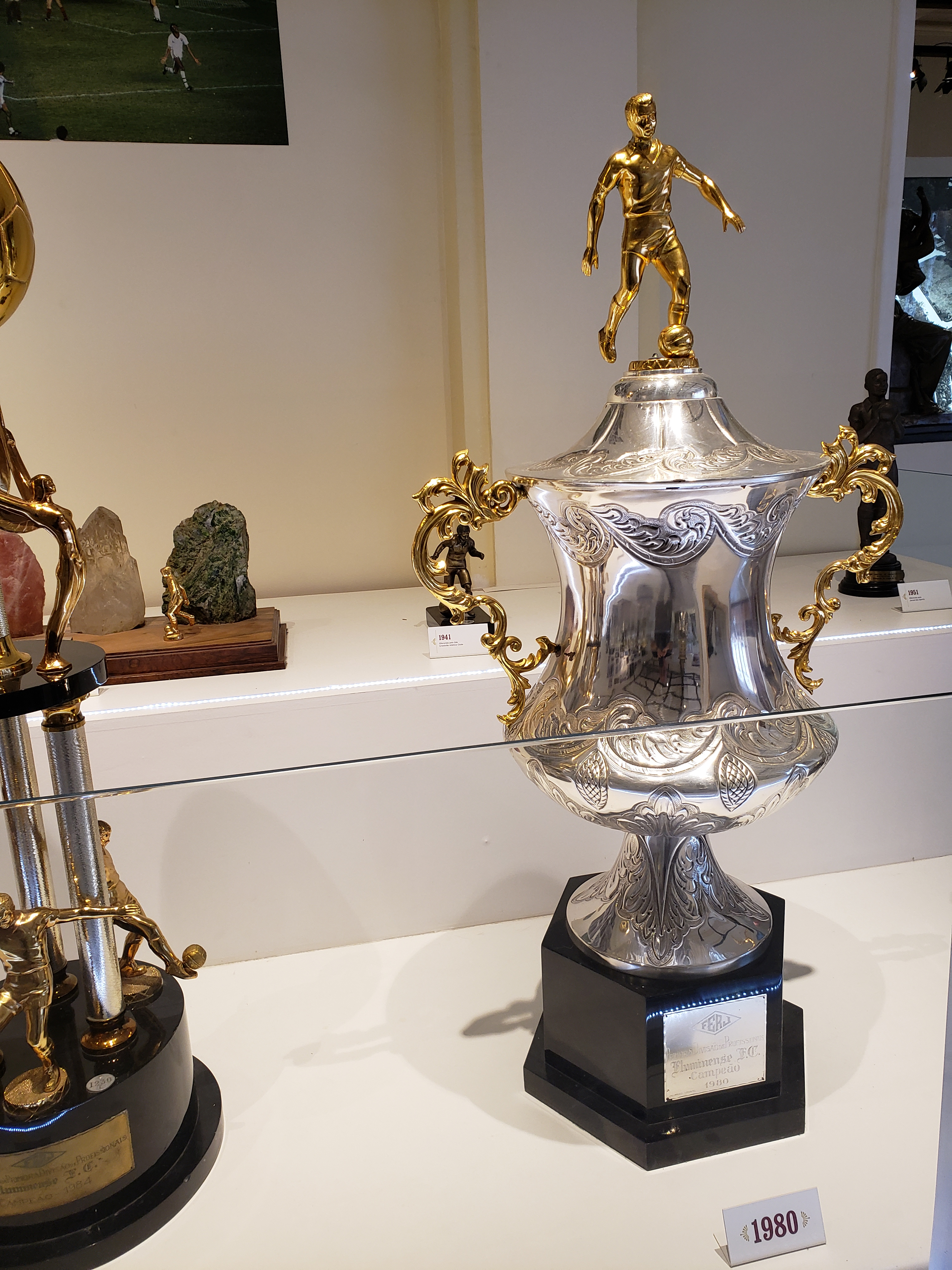 Taça do Campeonato Carioca de Futebol de 1980, conquistado pelo Fluminense Football Club em partida contra o Vasco da Gama.